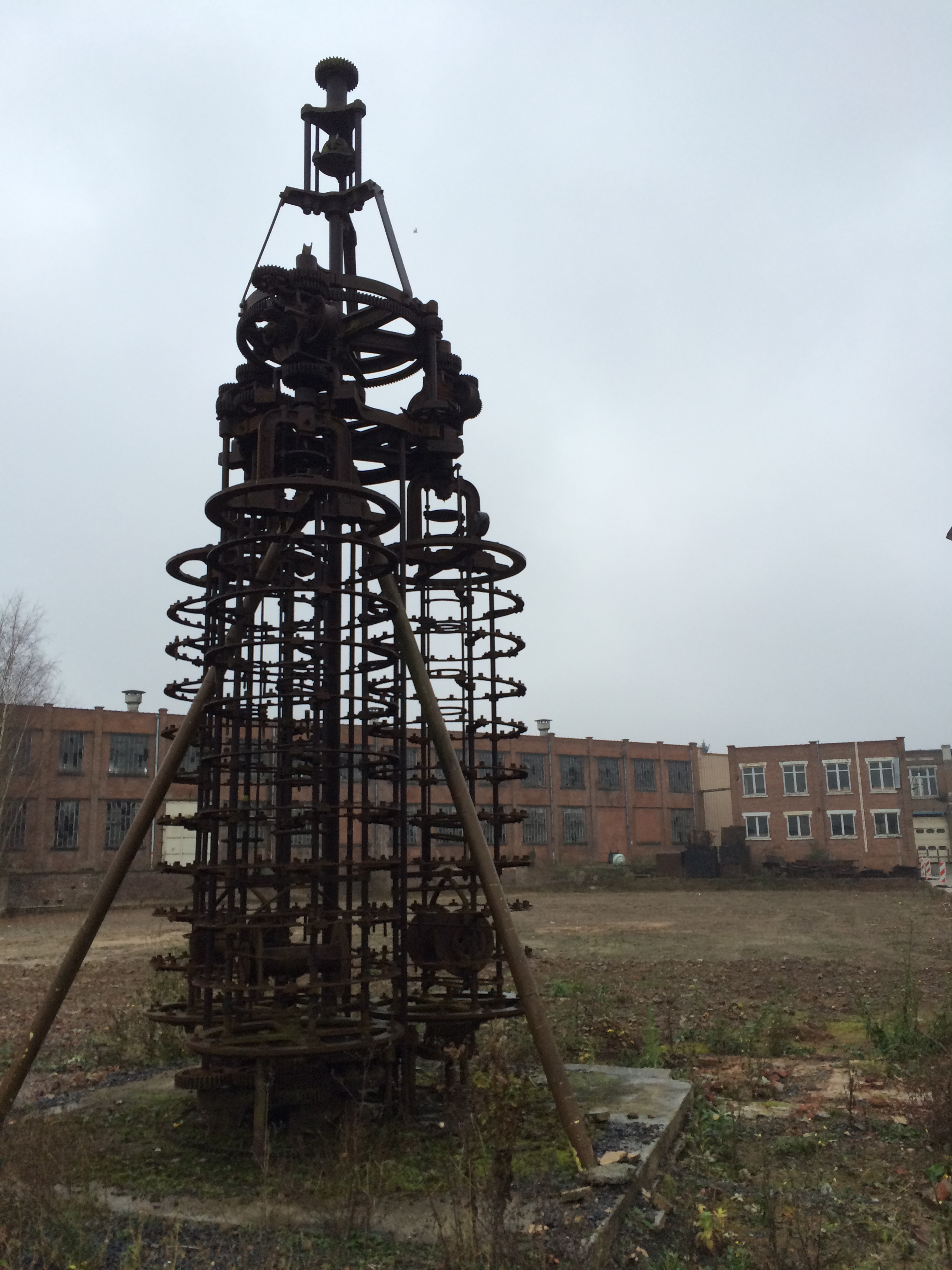 La valeuse vue depuis l'entrée pour camions